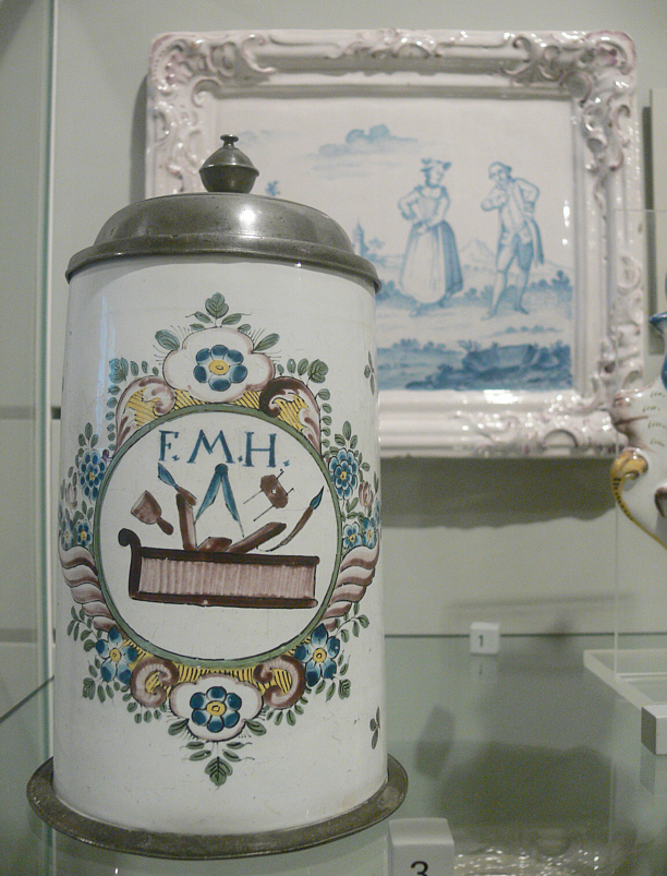 Bildplatte mit Allegorie des Frühlings (Hintergrund), Walzenkrug mit Zimmermannsemblem (Vordergrund) Schrezheimer Fayence (Schrezheim, heute zu Ellwangen), Ende 18./Anfang 19. Jh. Landesmuseum Württemberg (Außenstelle: Museum für Volkskultur Waldenbuch) E.5.5, Inv. Nr. 1754, Inv. 19319